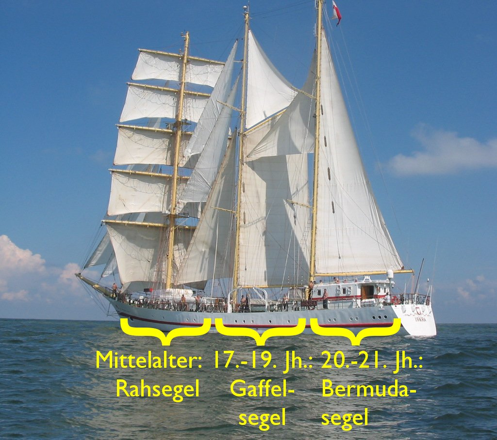 Die polnische Barkentine Iskra vereinigt die wichtigsten Segeltypen der europäischen Segelschiffe: Am Fockmast trägt sie Rahsegel, am Großmast ein Gaffelsegel mit Gaffeltopsegel und am Besanmast ein Bermudasegel.